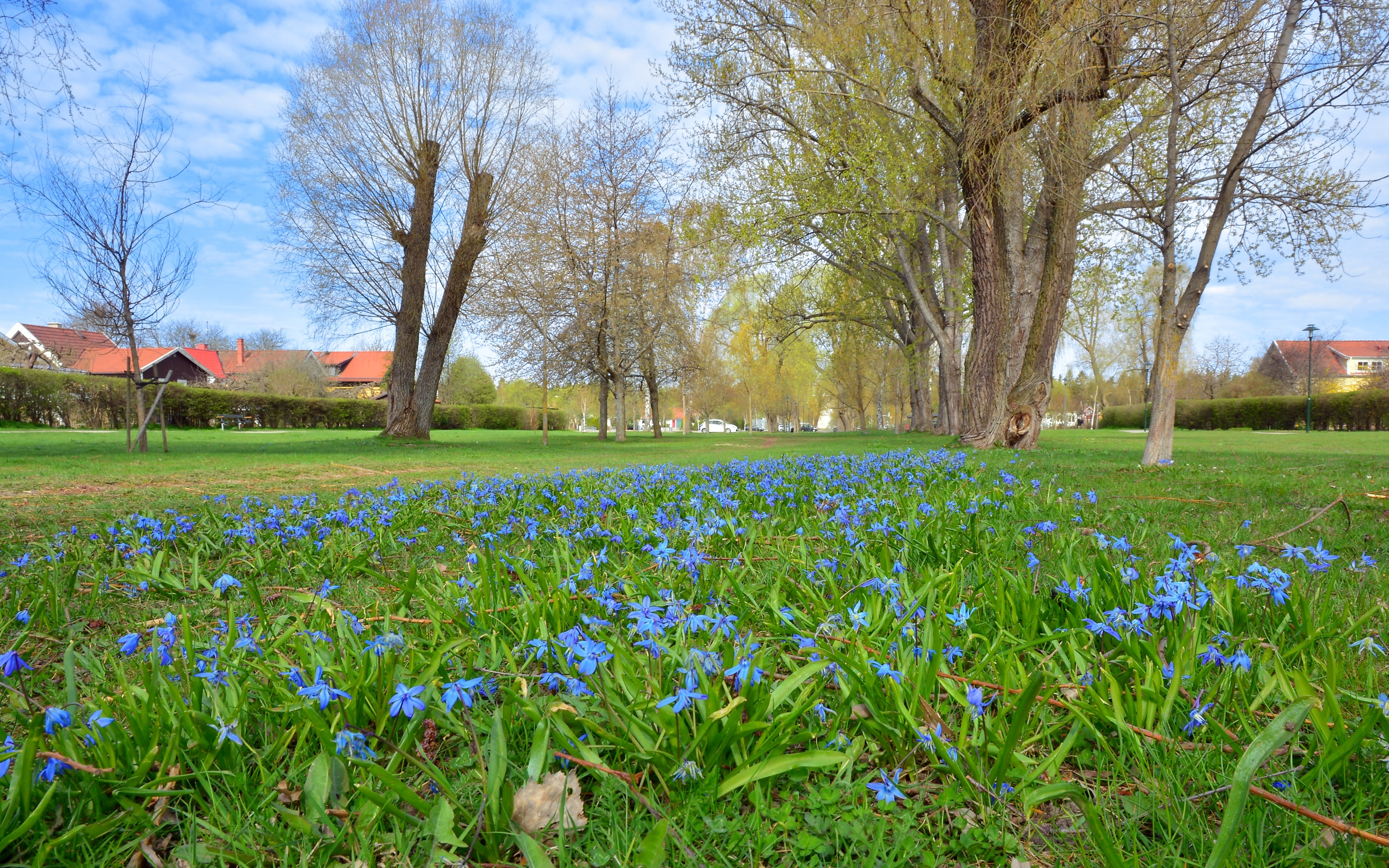 Vårflodsparken i Enskede i södra Stockholm.